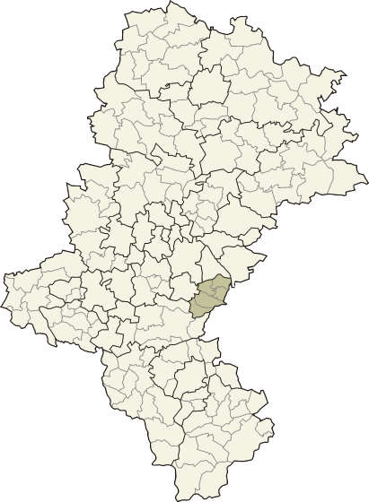 Powiat bieruńsko-lędziński w województwie śląskim